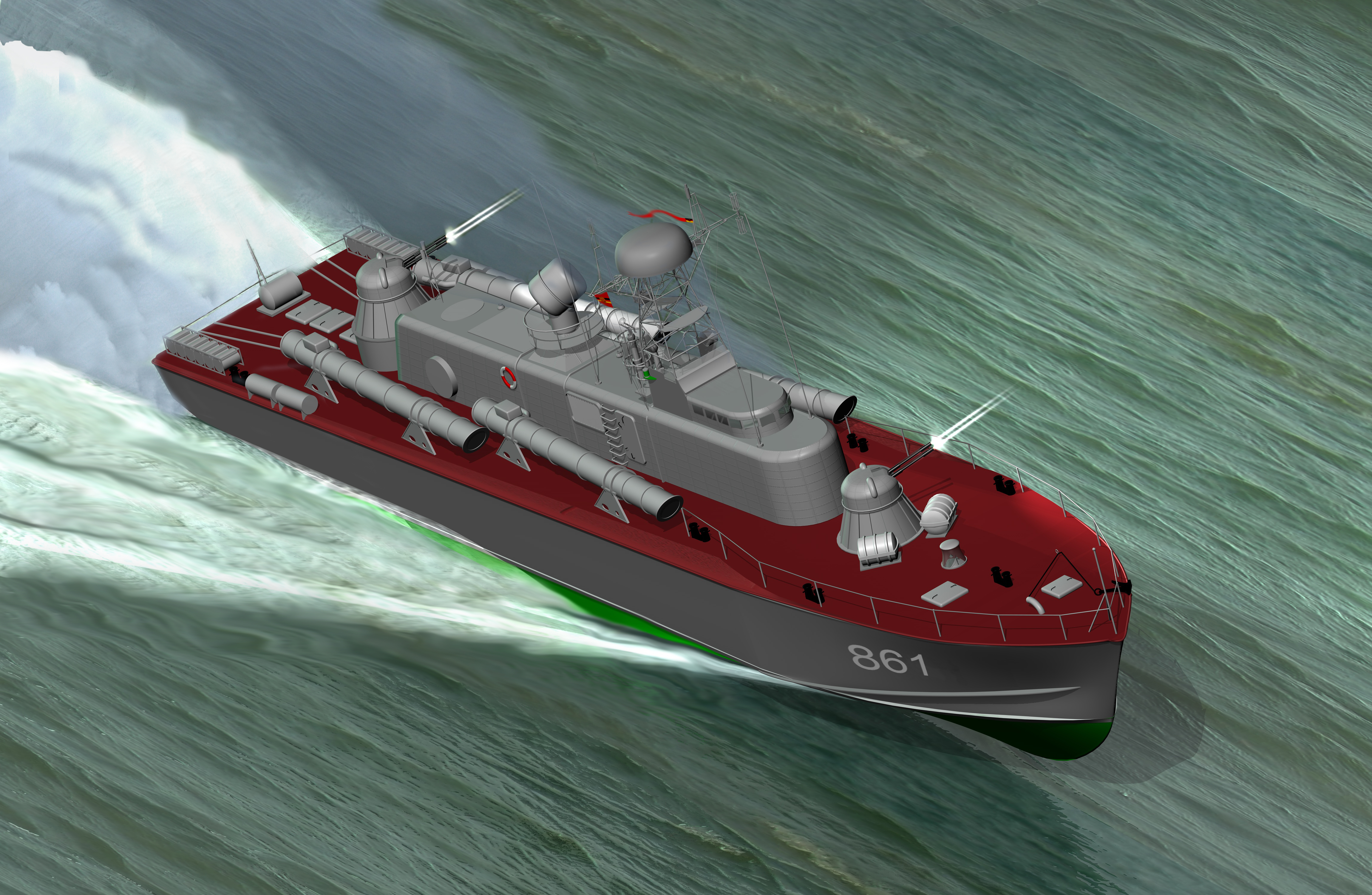 Schnellboot der Volksmarine der DDR in voller Fahrt mit Einsatz der Artillerie